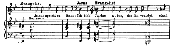 Extrait du récitatif n° 4